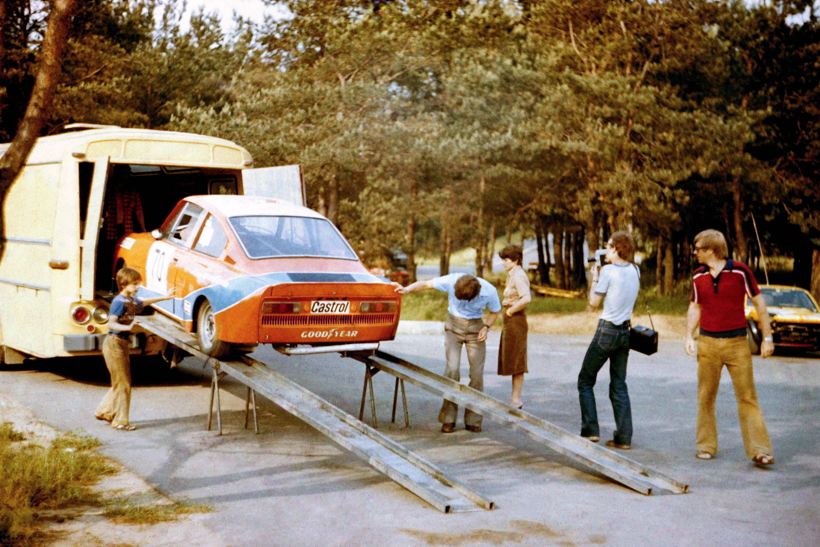 Škoda 130 RS Coupé Petera Martinovskiego w parku maszyn na torze Poznań ( 15. 06.1980 r. )